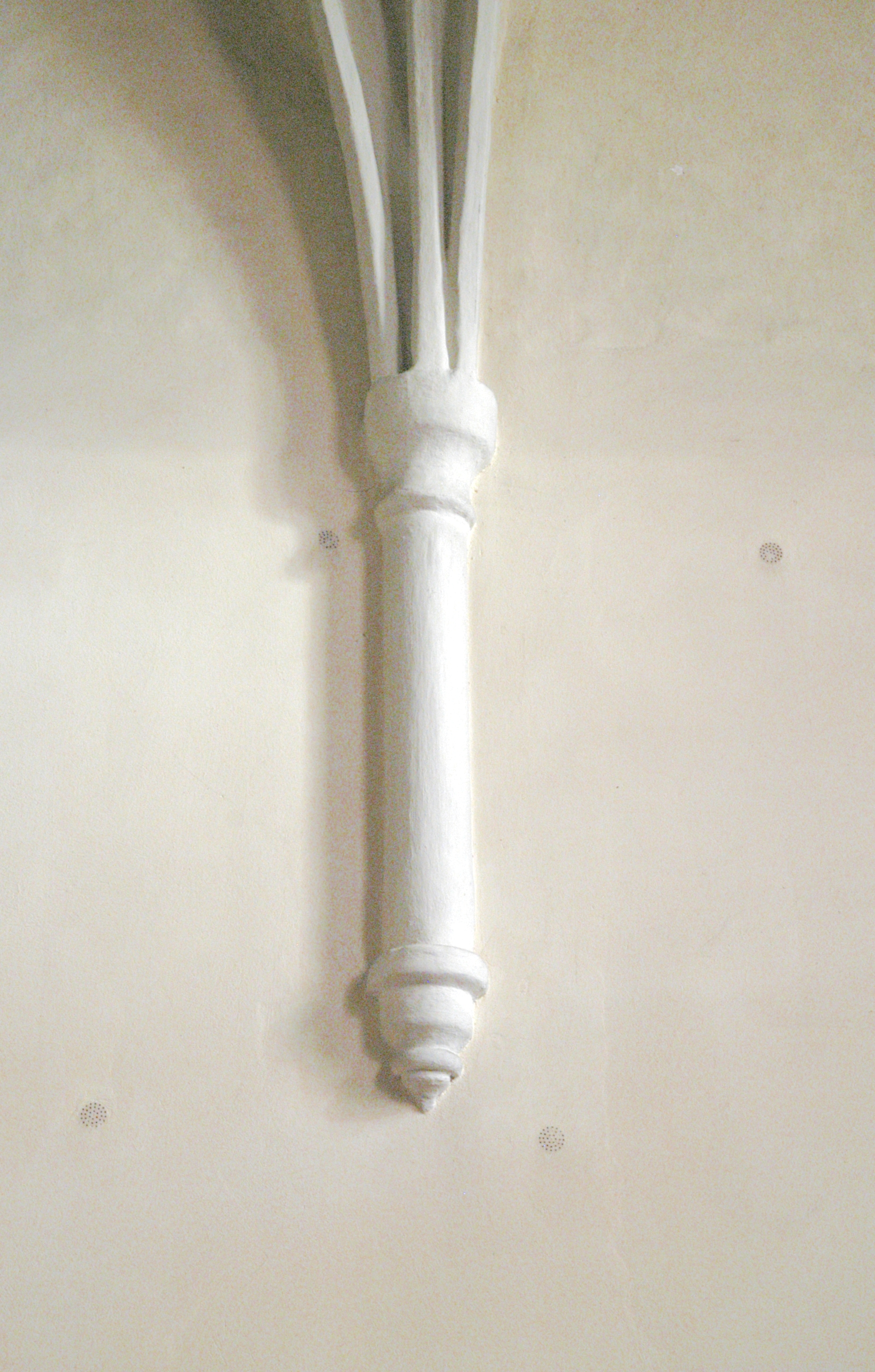 Kath. Pfarrkirche hll. Peter und Paul Chor Gewölbedetail